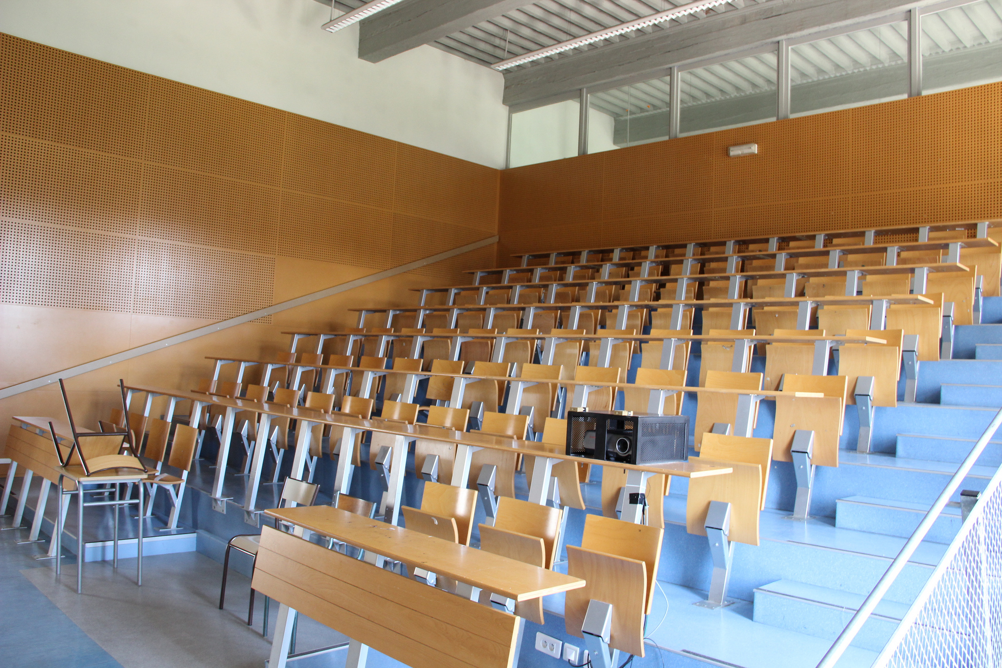 Amphithéâtre Sainte-Marthe